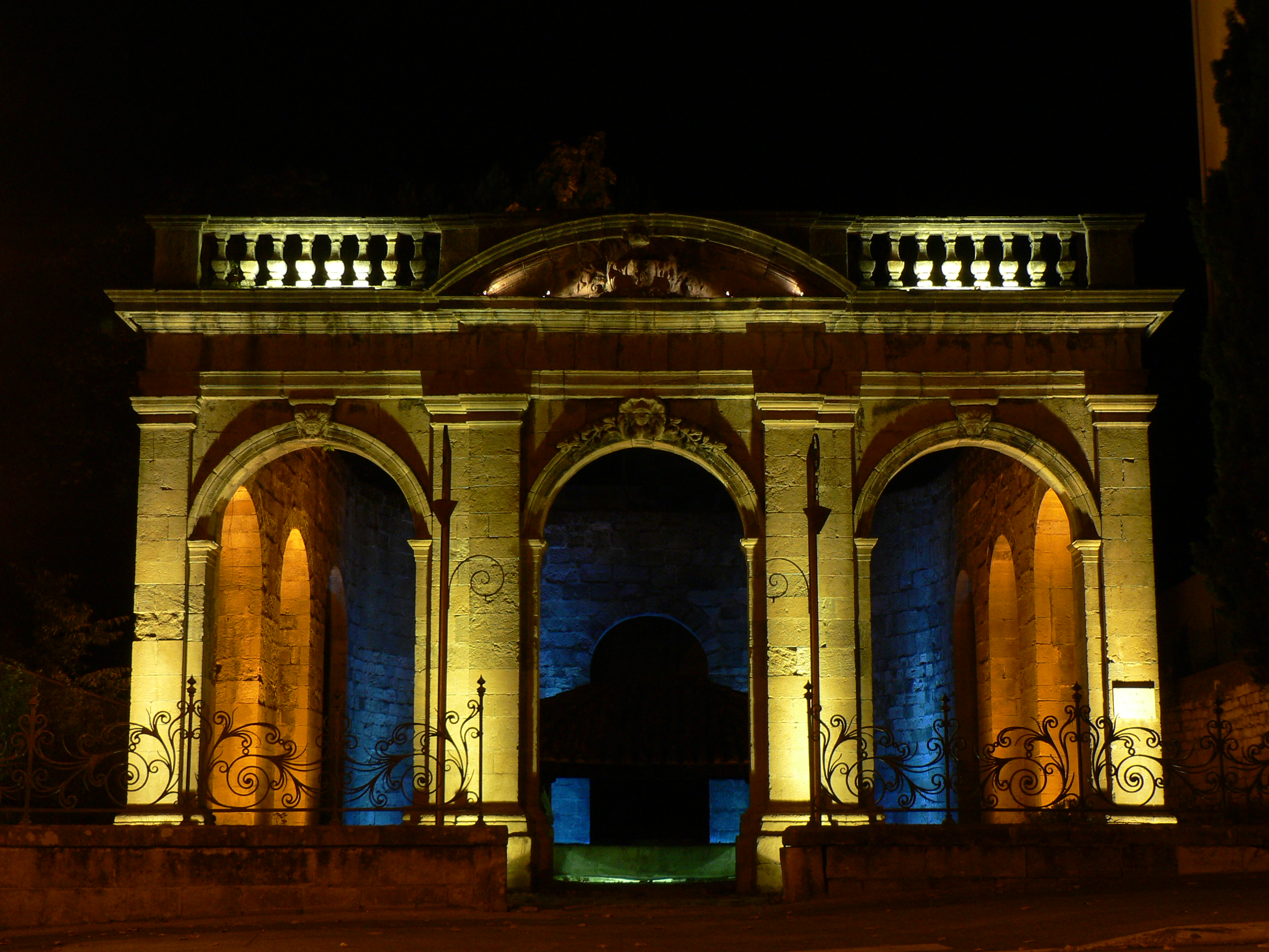 Vieux lavoir public